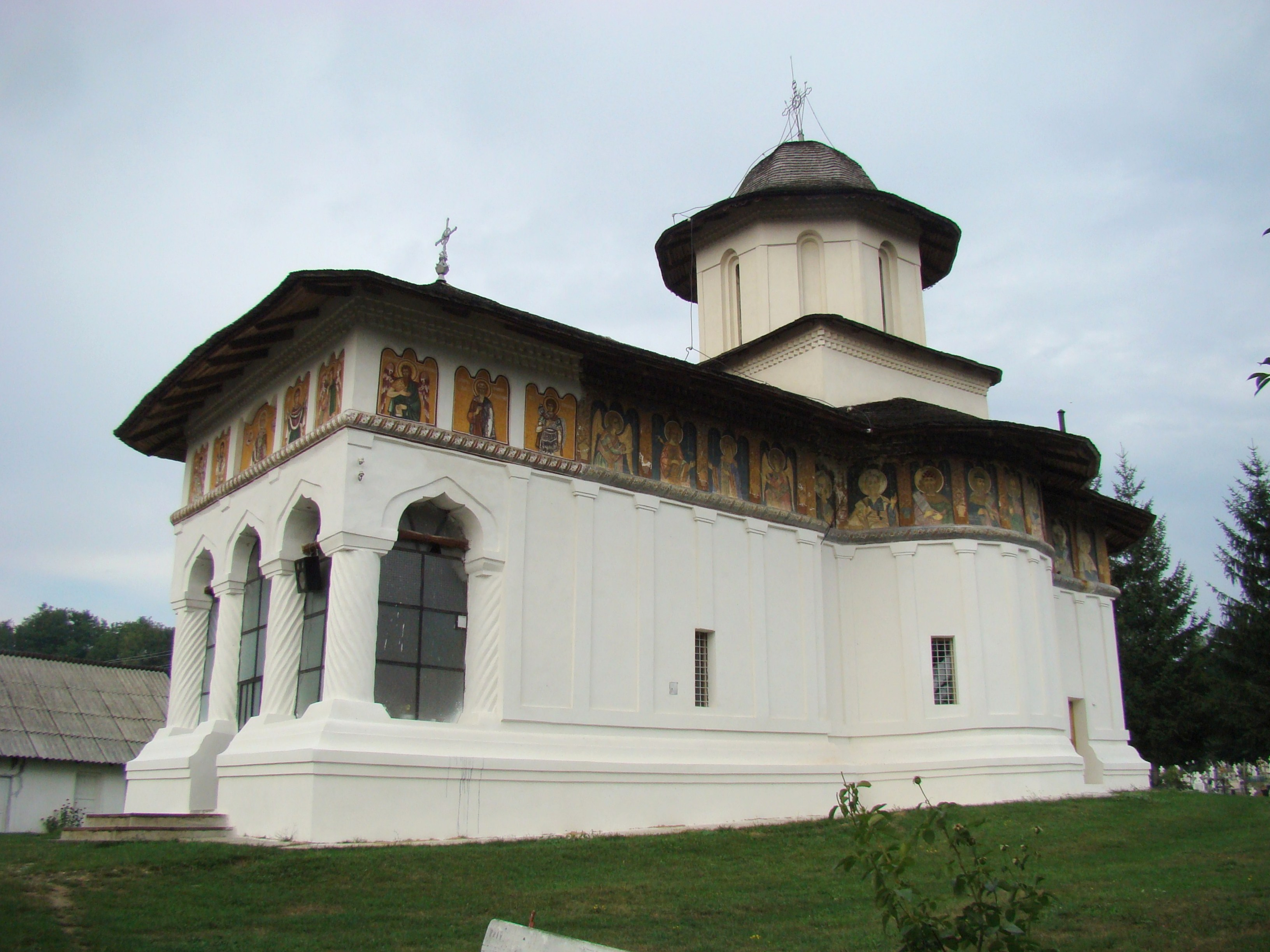 Ansamblul bisericii cu hramurile "Sf. Filofteia" și Sf. Nicolae", sat Valea Danului; comuna Valea Danului, județul Argeș